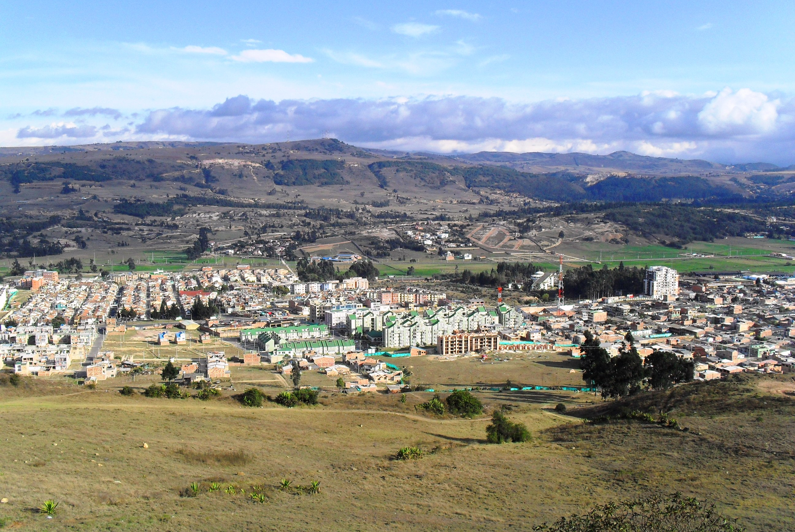 Panorámica del norte de la ciudad de Tunja, capital del departamento de Boyacá, Colombia